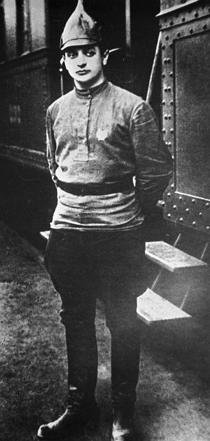 內戰時期的圖哈切夫斯基，俄羅斯新聞社檔案館亦有本照片